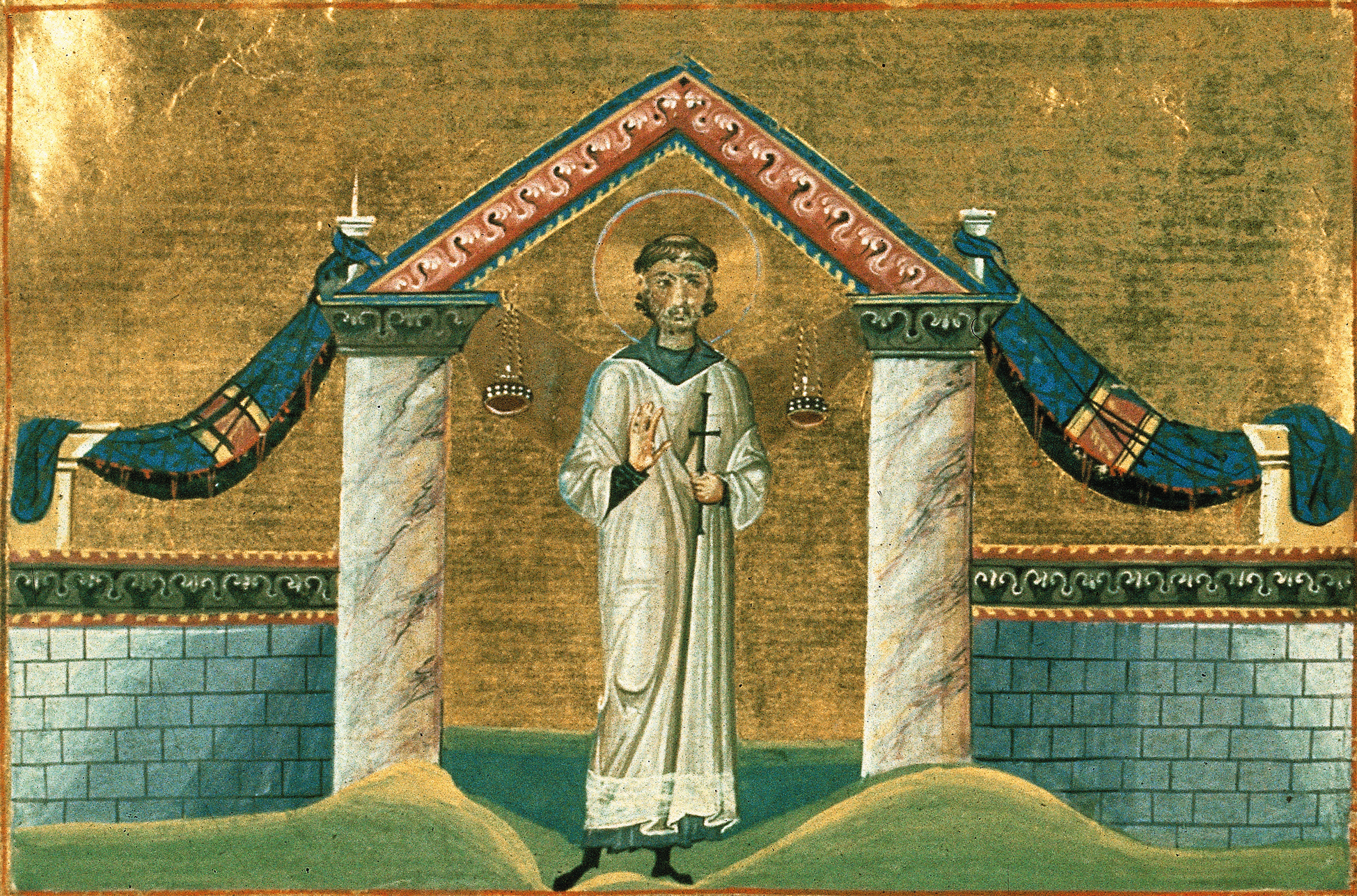 Викентий Августопольский (Сарагосский), Валенсийский, диакон, сщмч. Константинополь. 985 г. Миниатюра Минология Василия II. Ватиканская библиотека. Рим.